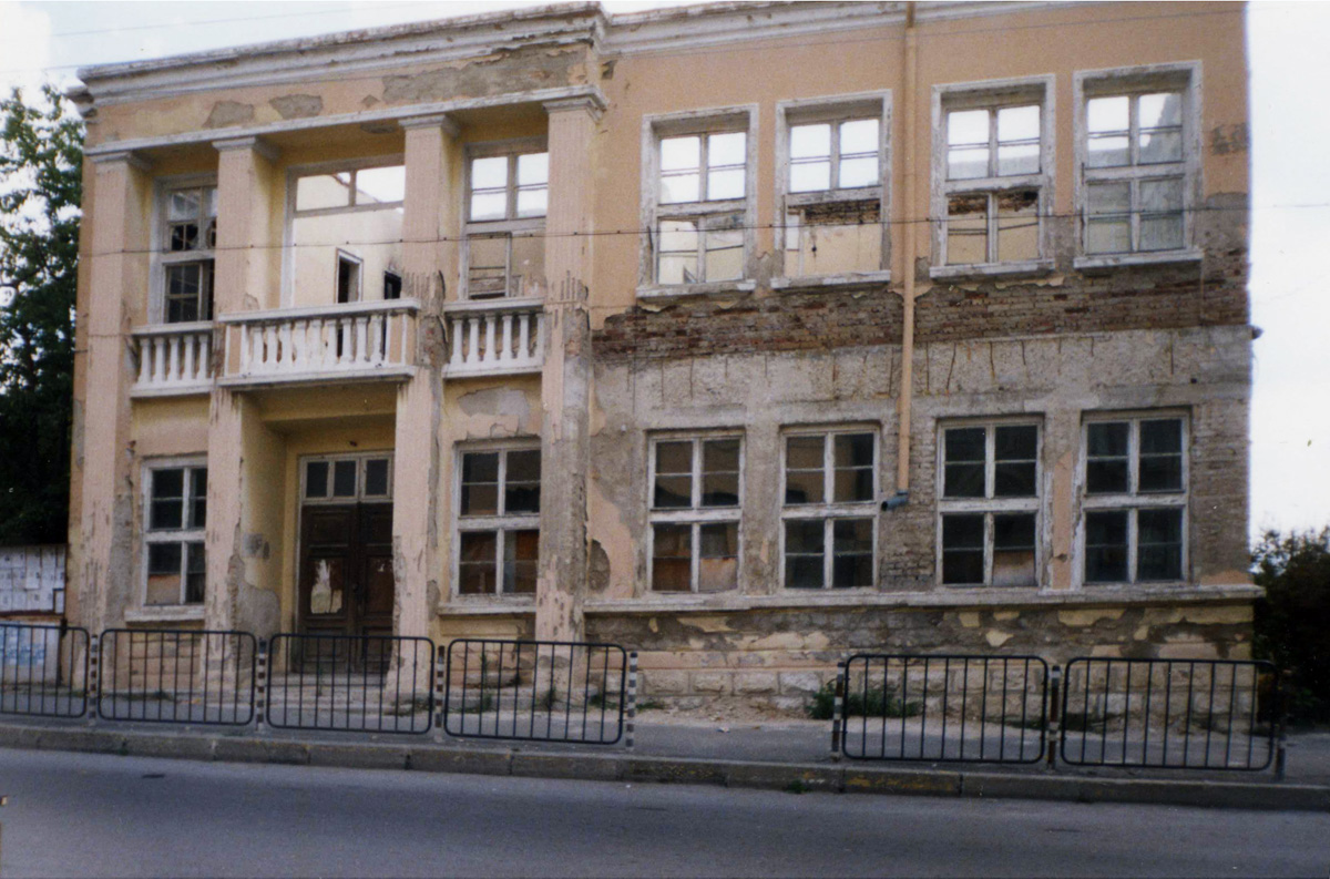 Останките от опожареното читалище в с. Дивдядово, построено през 1936-37 г.